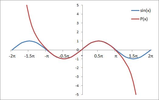 تابع سینوس (آبی) و سری تیلور آن (قرمز، تا درجه ۷) در یک تناوب کامل (متقارن نسبت به مبدأ) تقریباً با یکدیگر برابر هستند.